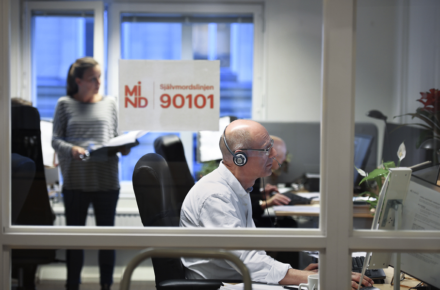 Minds Självmordslinje är Sveriges enda suicidpreventiva stödlinje som är öppen dygnet runt, via chatt och telefon.